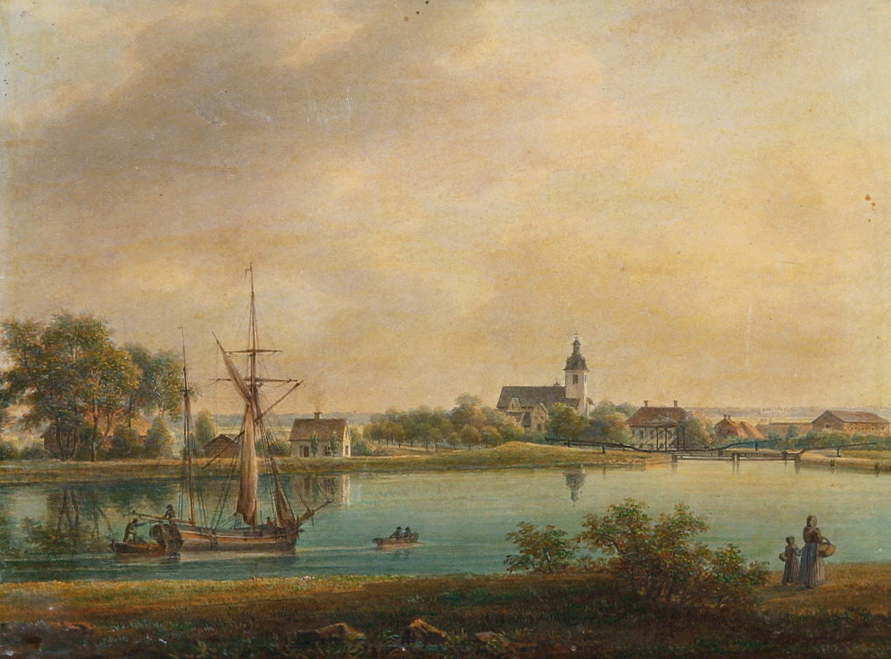 Motiv från Vreta Kloster